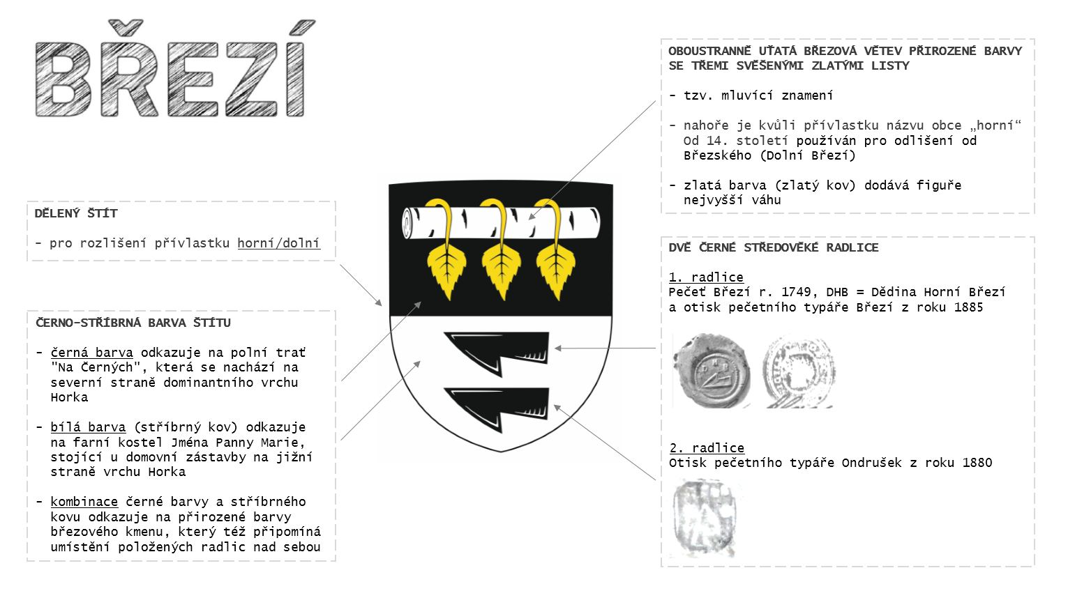 Popis jednotlivých figur znaku